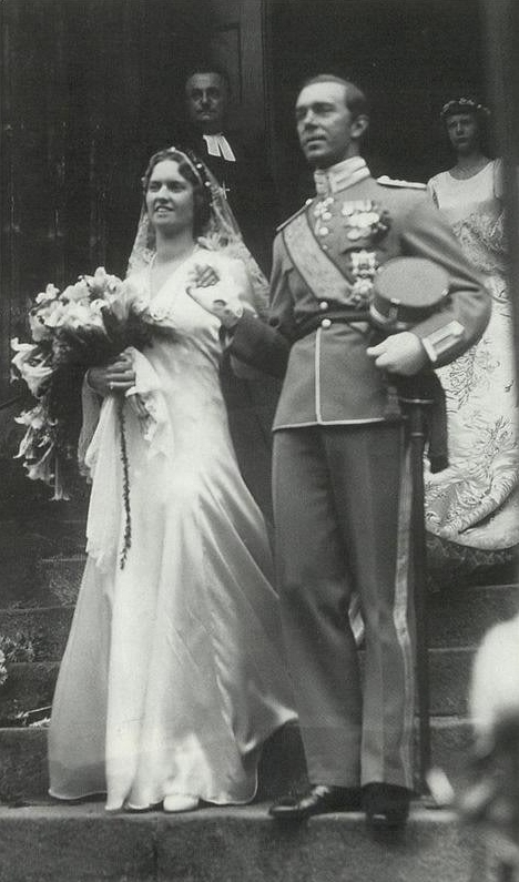 Gustaf_Adolf_and_Sibylla_at_their_wedding_1932